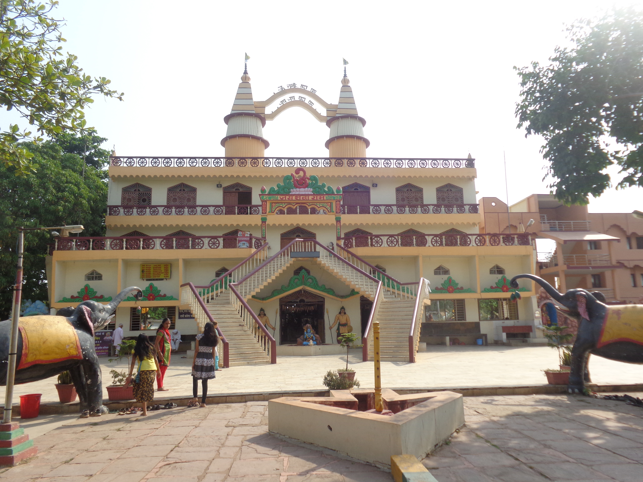 sadani darbar, new raipur, chattisgarh, asram building